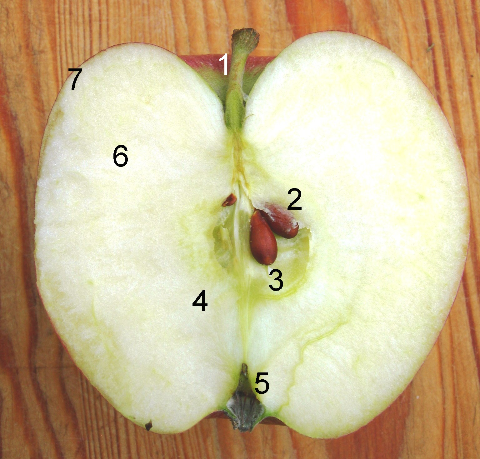 Pome (apple). 1: stem, 2: seed, 3: endocarp, 4:mesocarp, 5: calyx, 6: pulp, 7: peel)